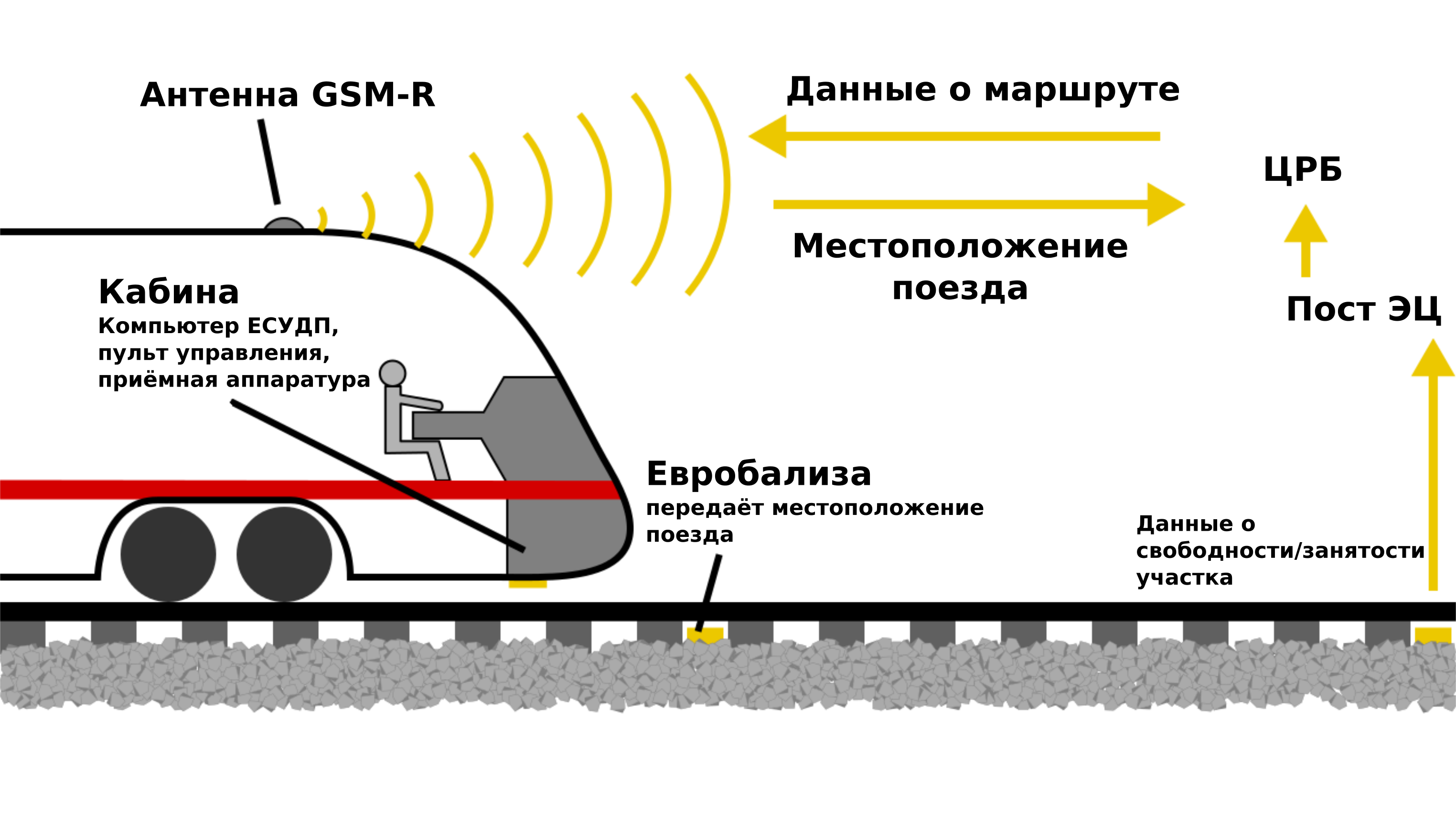 Схема работы Европейской системы управления движением поездов второго уровня